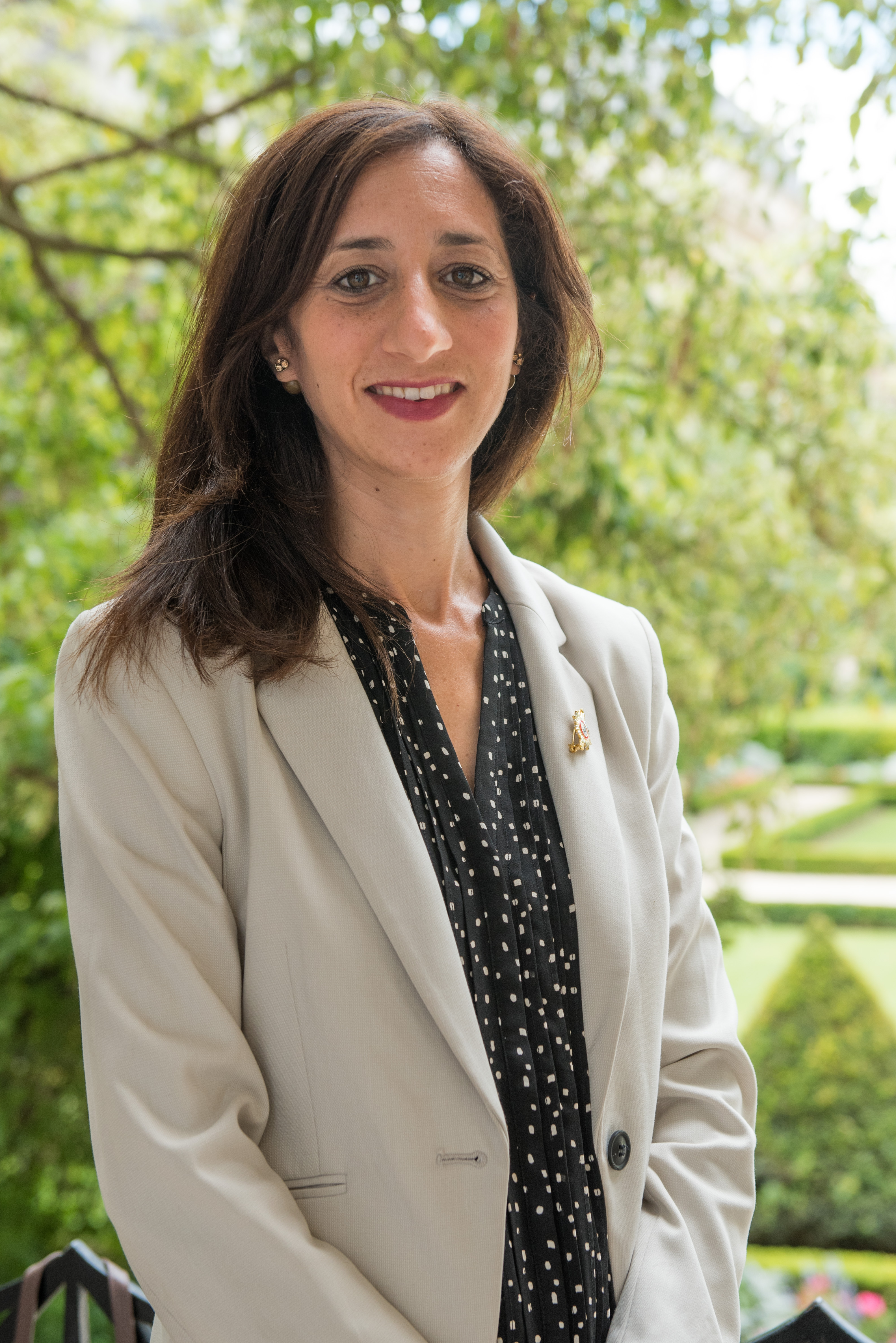 Anissa Khedher dans le jardin des Quatre colonnes du palais Bourbon en 2017.